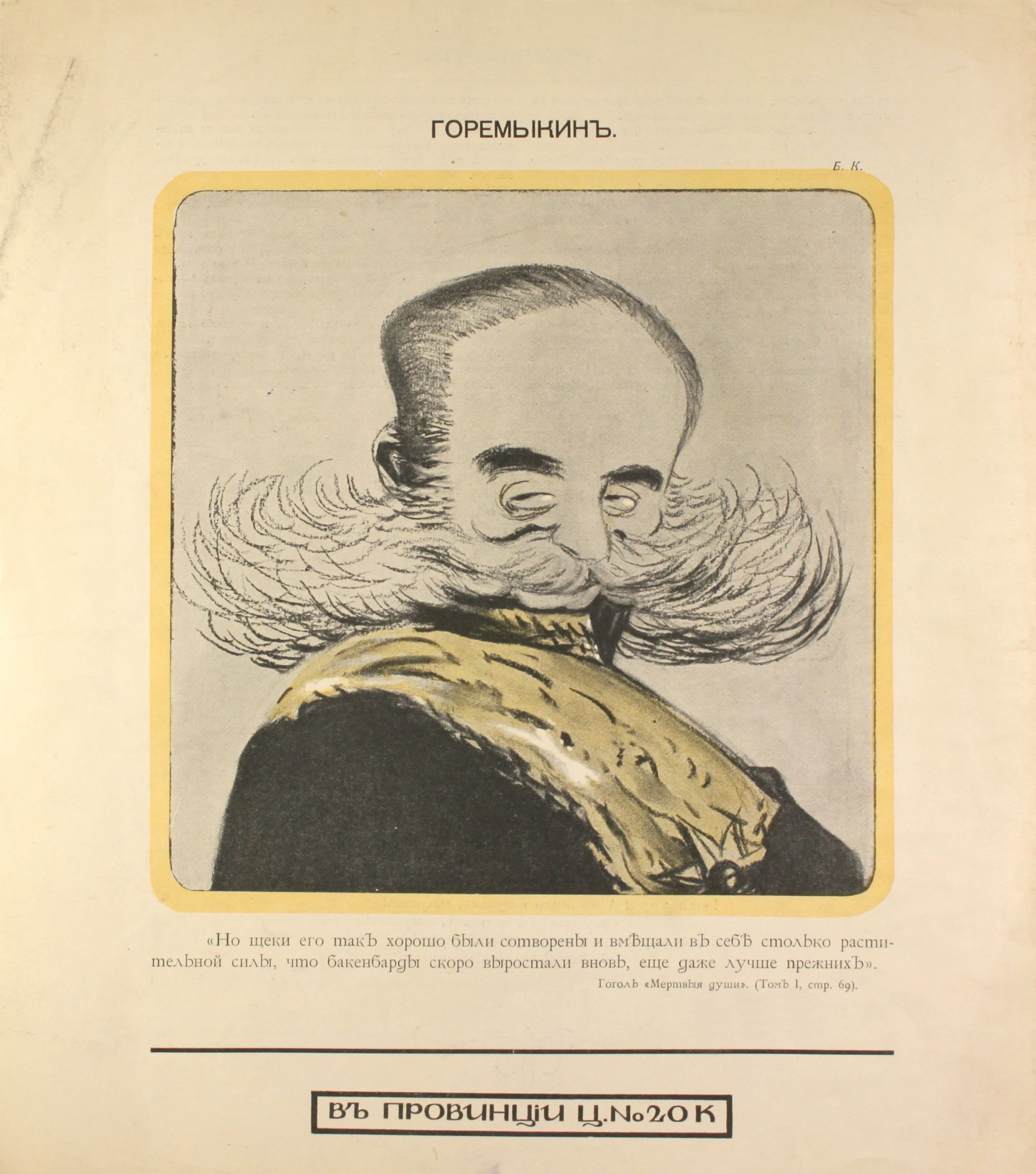 Д.Н. Кардовский. «…Нижний чин должен ходить…» (обл.); Б.К. [Б. Кустодиев]. Горемыкин (рис.); Е.Е. Лансере. Тризна (рис.). «– Рады стараться, Ваше Превосходительство!..» (рис.); М.Д. [М. Добужинский]. Заставка. Заставка; И.Б. [И. Билибин]. Рисунок. Заставка // П.Н. Троянский (ред.). Адская почта. Вып.2. СПб.; Изд.: Е.Е. Лансере; Т-во Р. Голике и А. Вильборг. СПб., Звенигородская, 11; 15 к., в провинции 20 к.; 1906